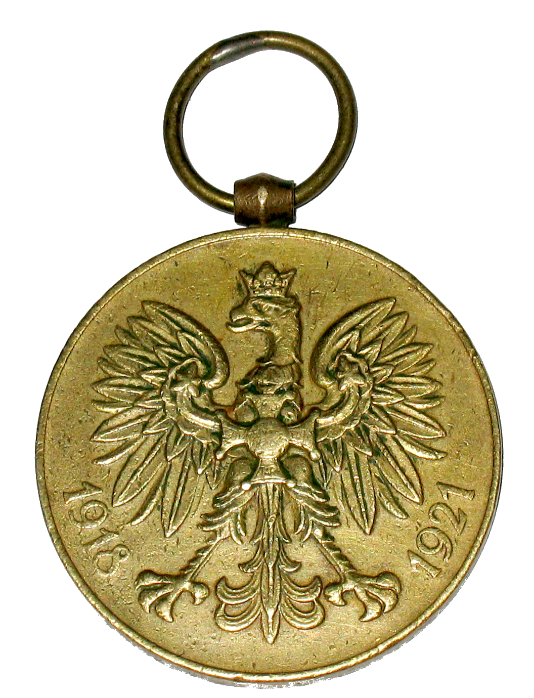 Medal PSO za wojnę 1918 1921 awers